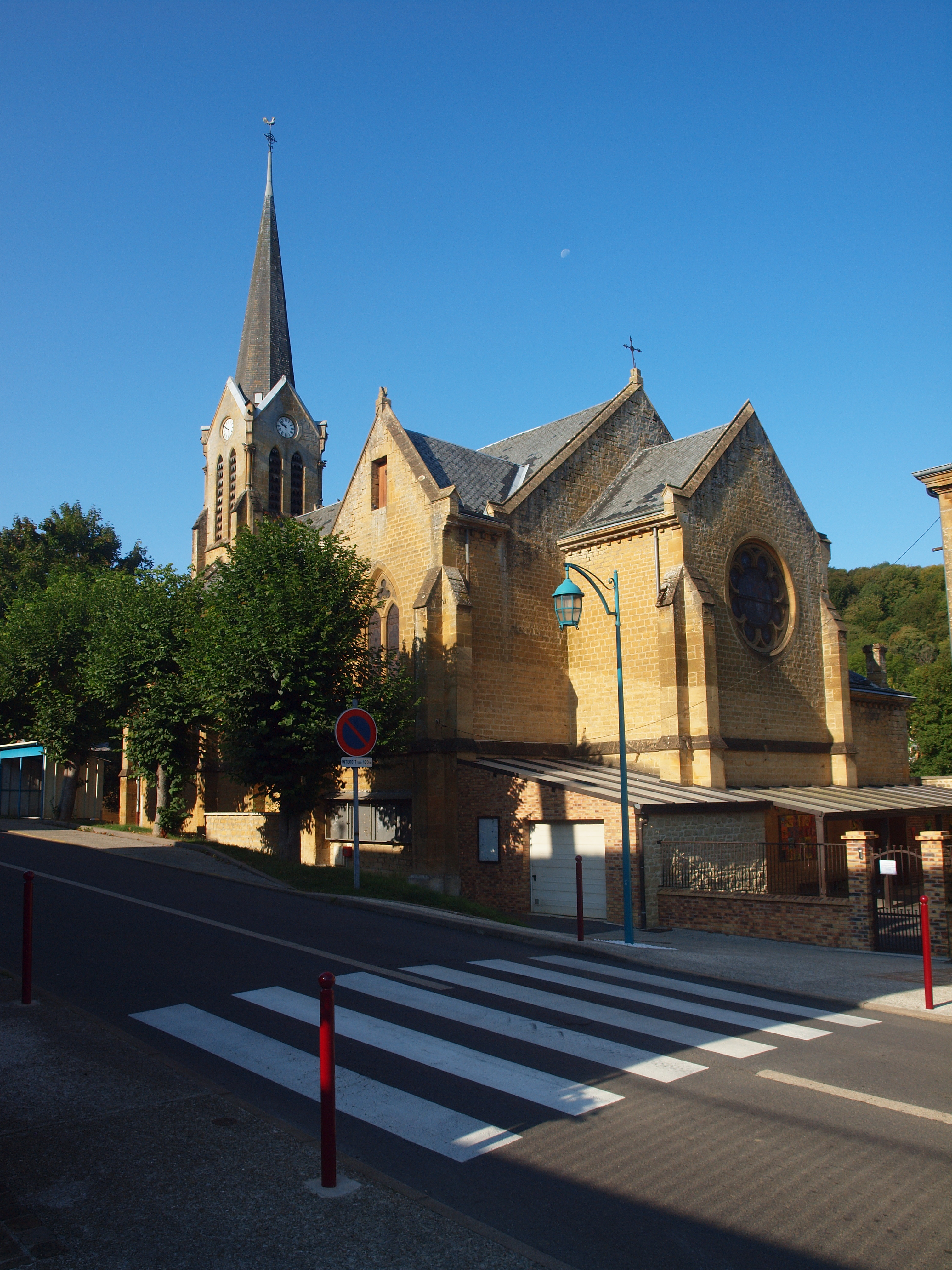 Église Saint-Rémi de Boutancourt (Ardennes, France)